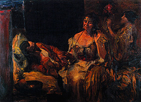 Painting Scheherazade by Max Slevogt